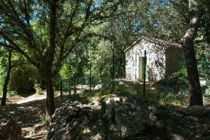 Brissac (France, 34) - Le Sentier de l'Eau Galet (étape) n°02 : Le périmètre de protection du captage d'eau potable